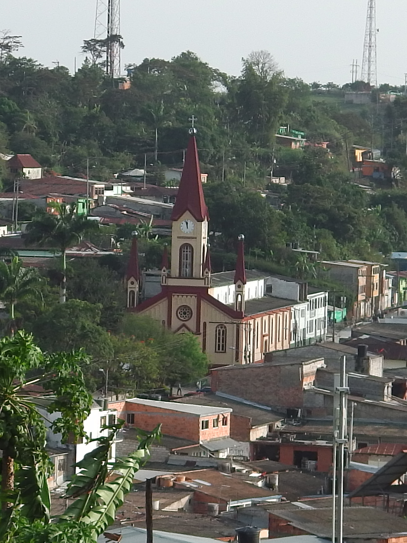 Panoramic of Caparrapí, Cundinamarca en Colombia.